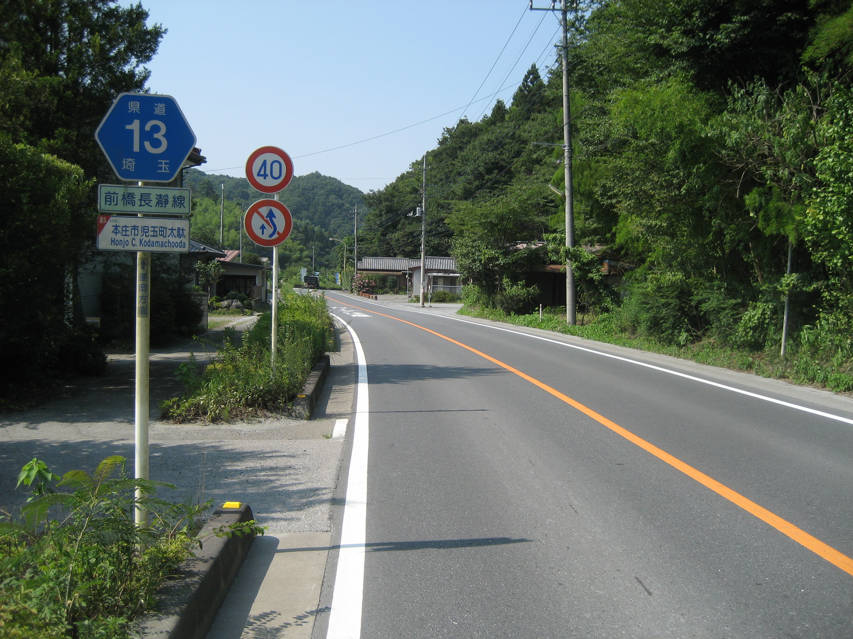 埼玉県道13号線本庄市児玉町内